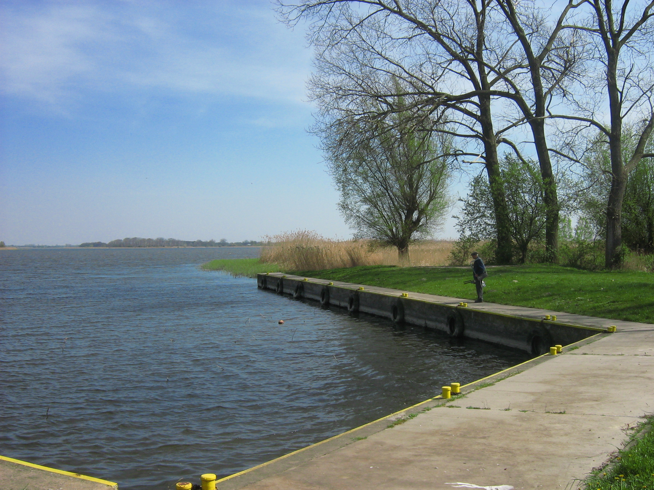 Nabrzeże w porcie w Sierosławiu